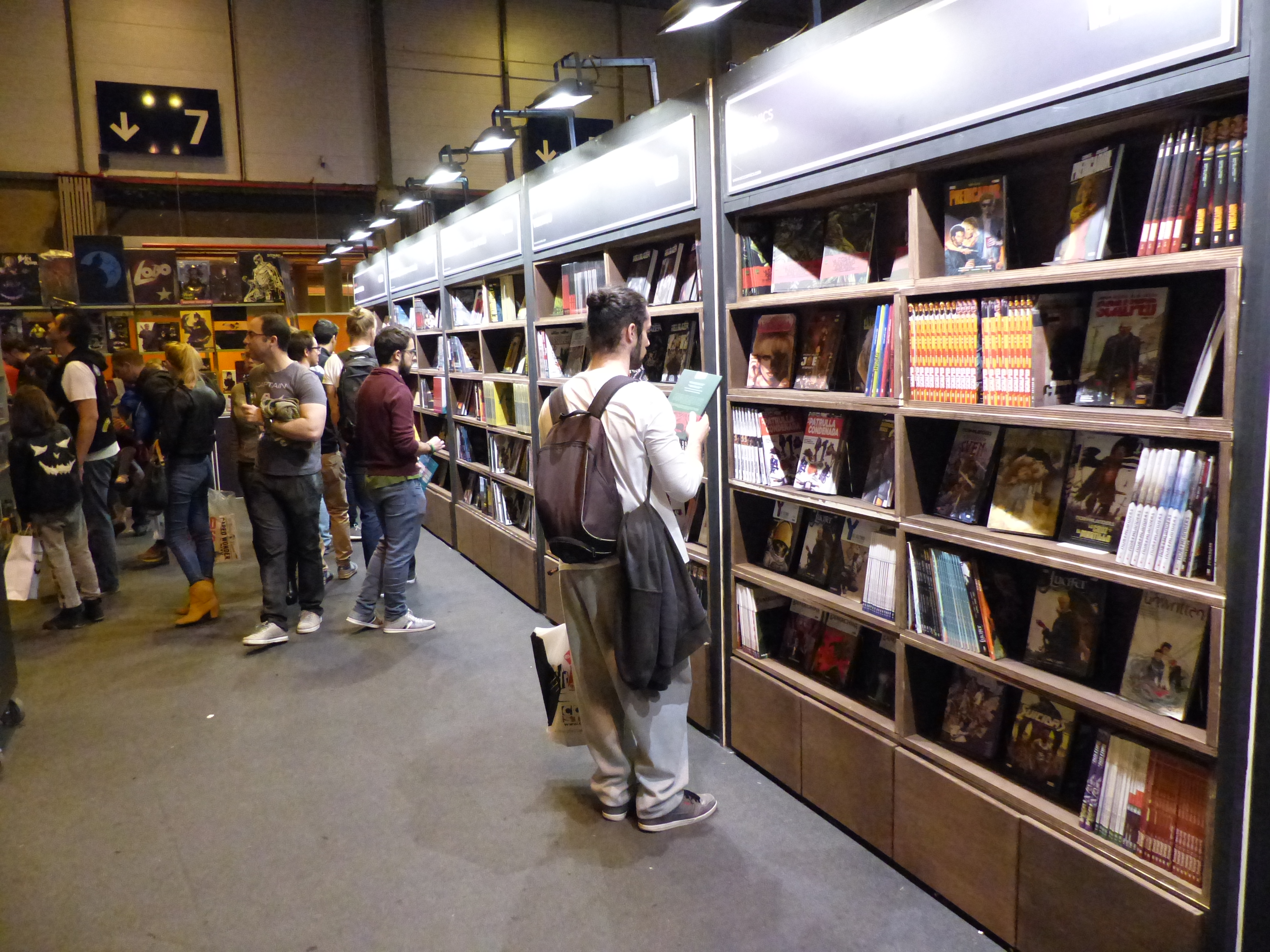 Heroes Comic Con, Madrid, España, 2017